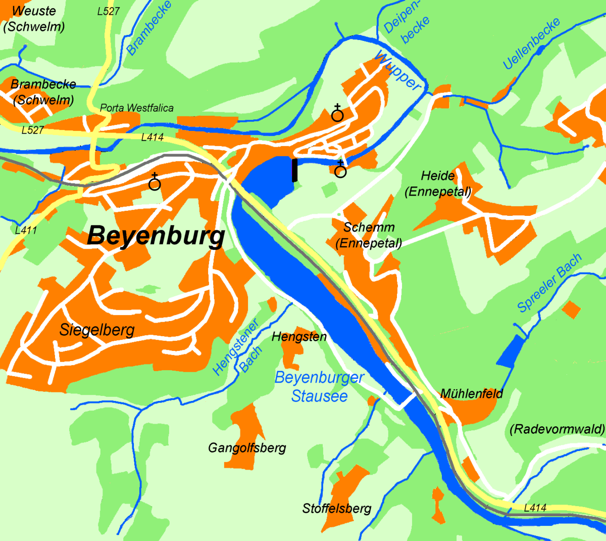 Karte von Wuppertal-Beyenburg (mit einem Teil Ennepetals)